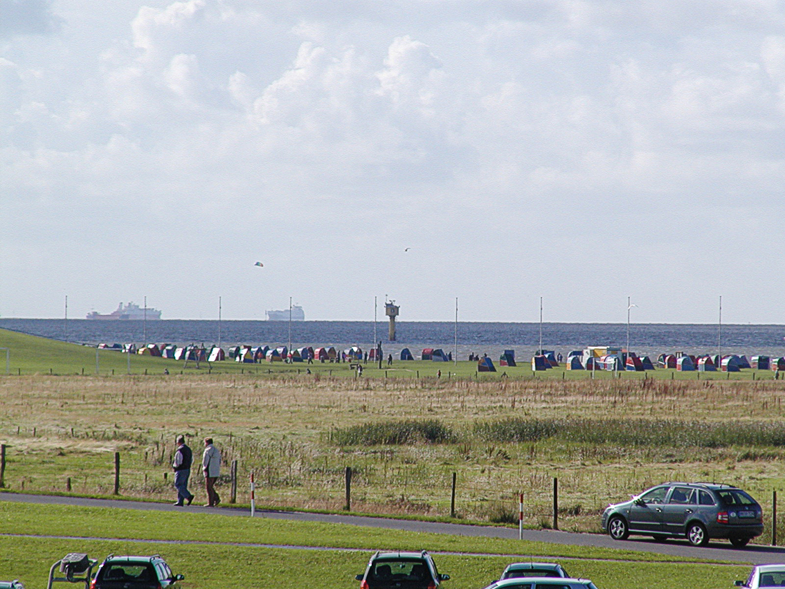 der Strand in Otterndorf